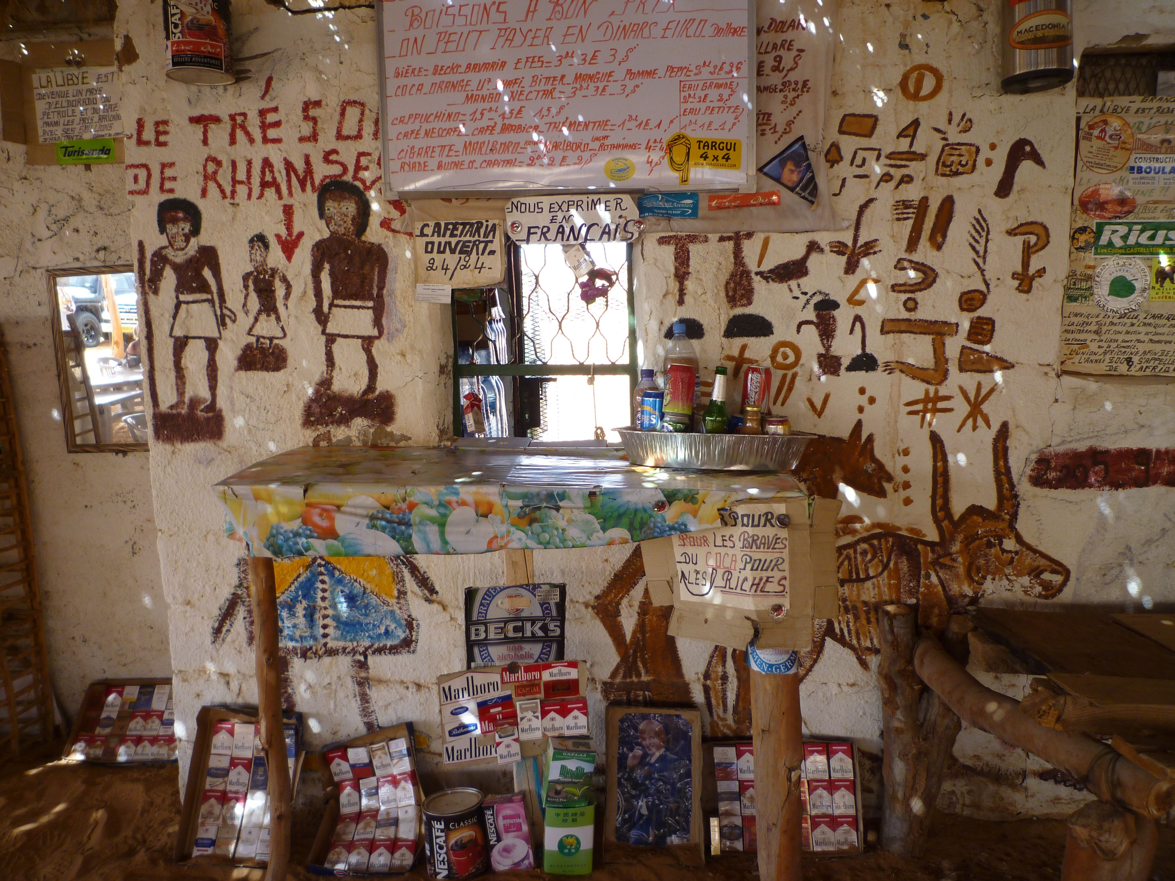 Alfejej - Oase Gabrun, Lokal